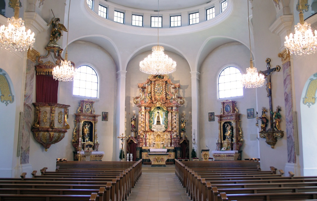 Pfarrkirche Mariä Himmelfahrt in Bodenmais: Blick zum Hochaltar